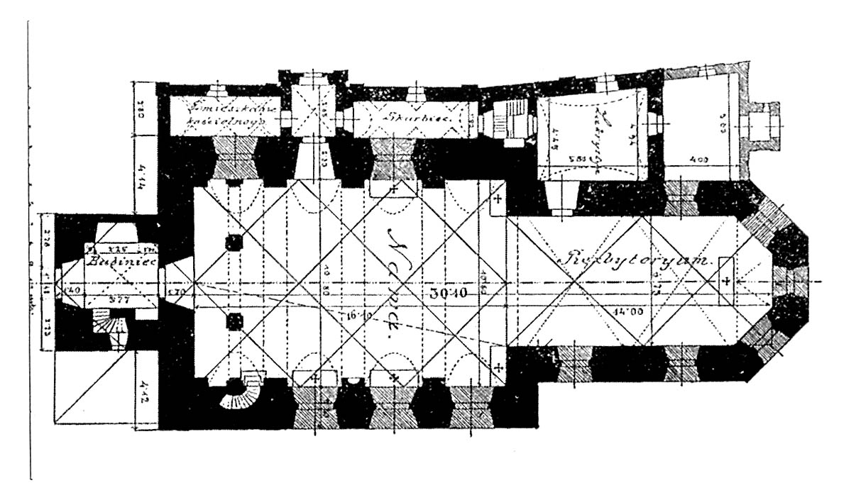 План костелу Марії Сніжної (нині церква Матері Божої Неустанної Помочі) у Львові. Автор Юліан Захаревич (1837-1898)